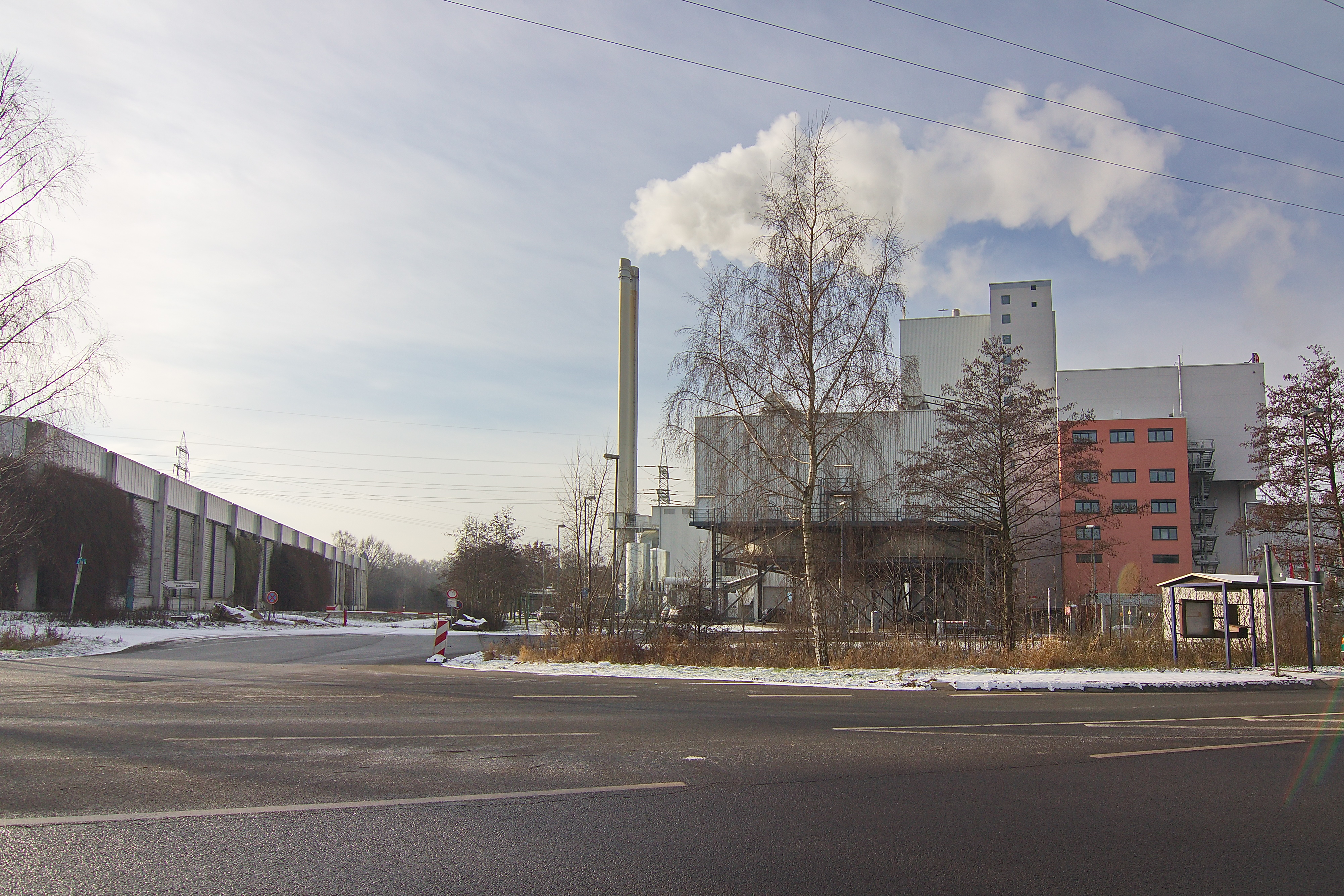 E.ON Energy from Waste GmbH in Lahe (Hannover), Niedersachsen, Deutschland